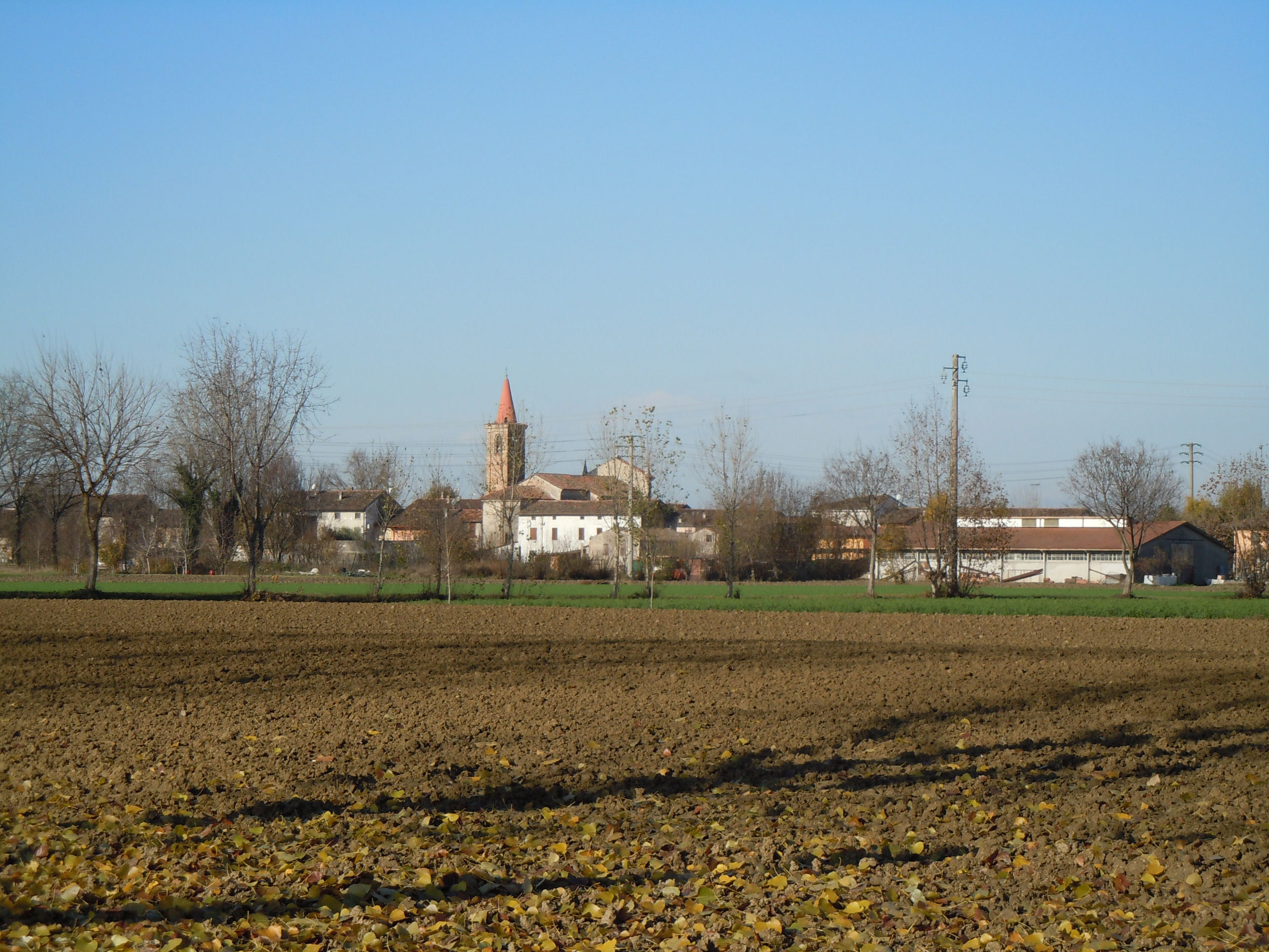 Casalpoglio